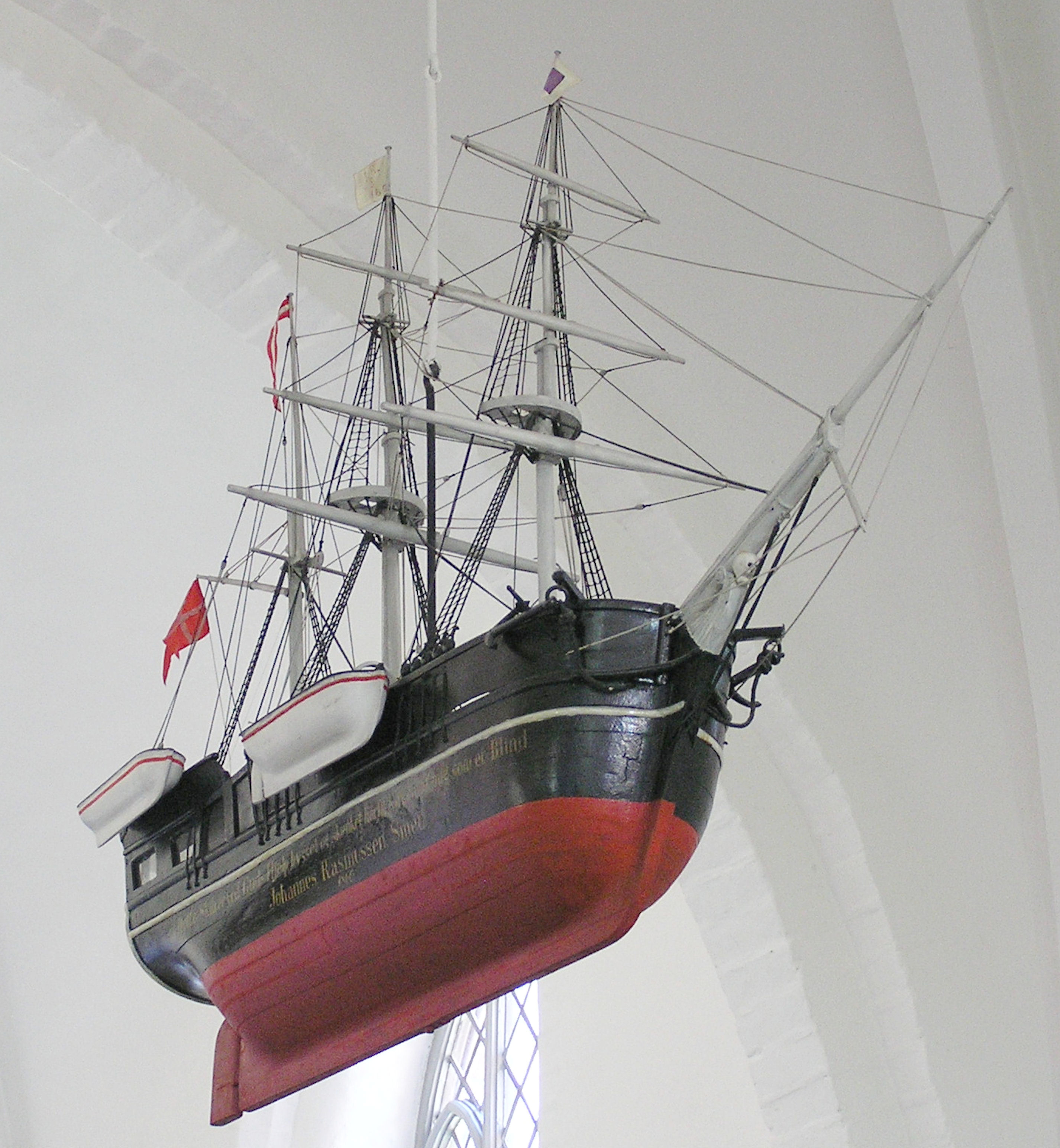 Unavngivet tre master skib ophængt i Sct. Mikkels Kirke, Rosengade 4, 4200 Slagelse På siden af skíbet er skrevet: ’Dette Skib er med Guds Hjælp bygget og skenket af mig, som er blind. Johannes Rasmussen. Smed. 1860’ Sandt? Men en god historie.